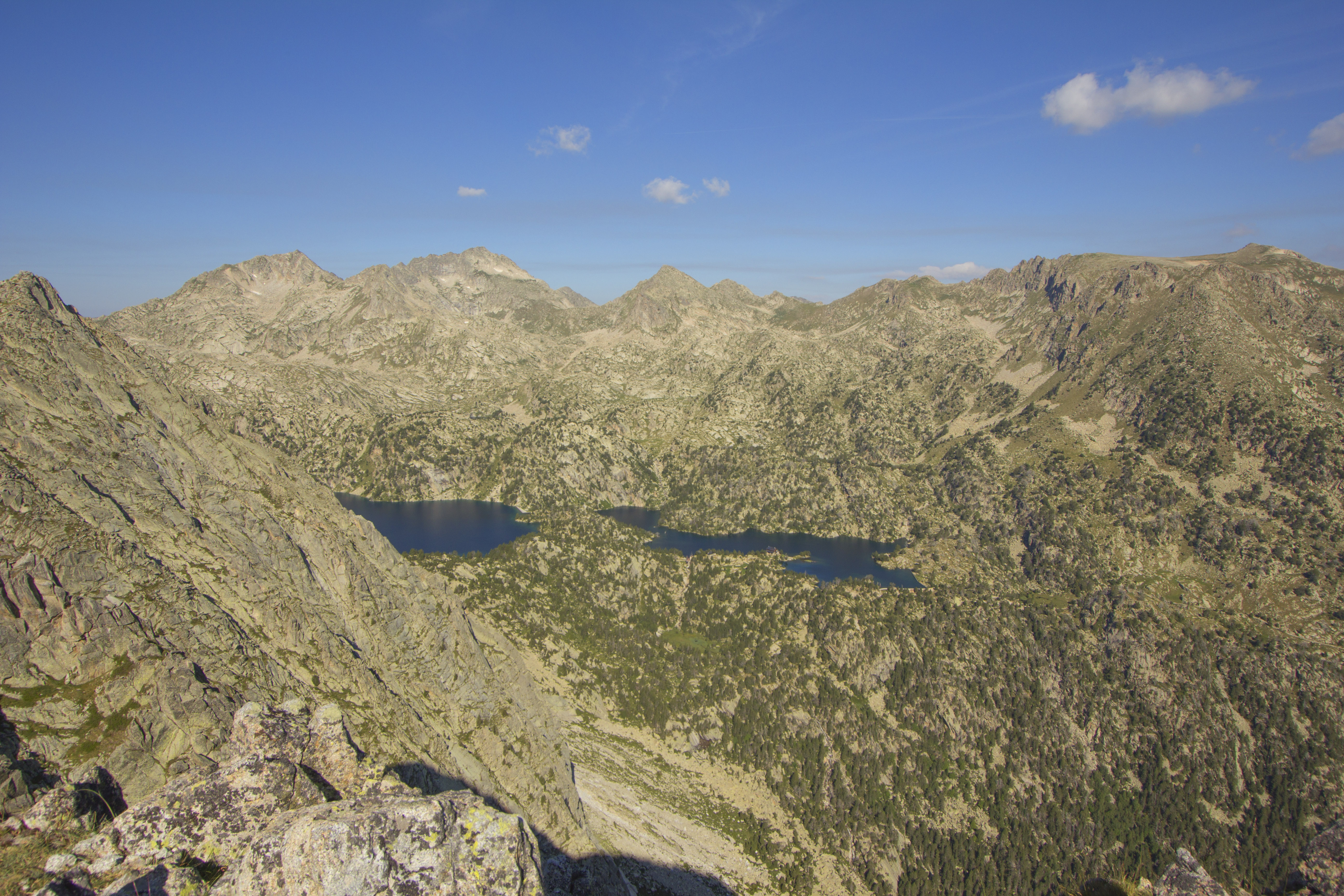 Estanys Tort de Peguera (esquerra) i Negre des del Pic d'Eixe, Espot (Pallars Sobirà)